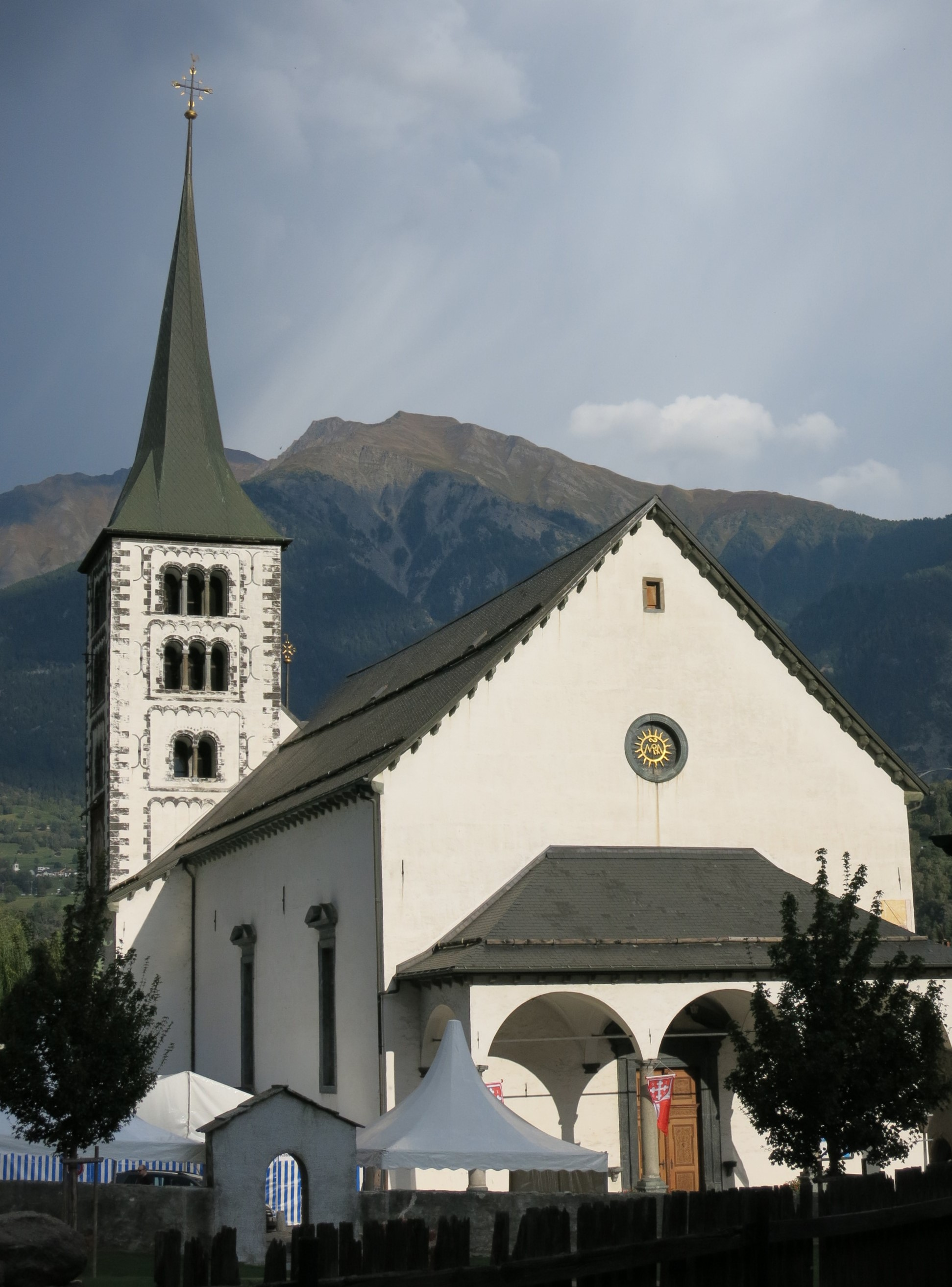 Naters VS, Schweiz